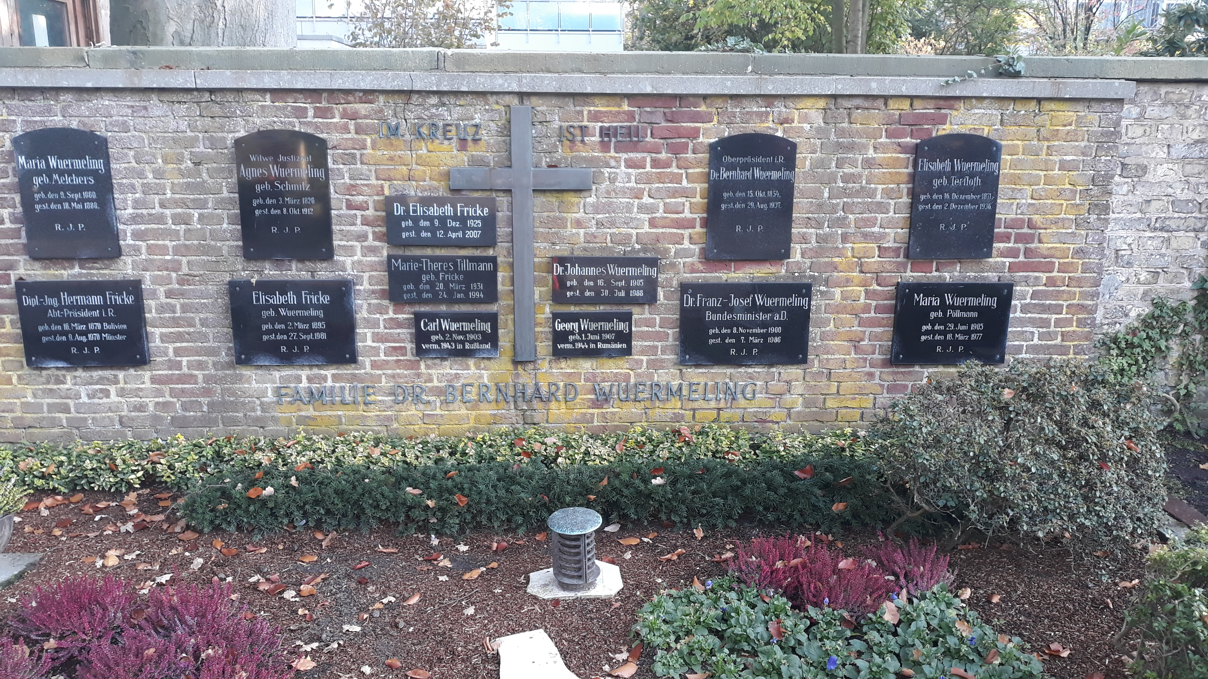 Das Grab der Familie Wuermeling, darunter Bundesminister Franz-Josef Wuermeling, auf dem Zentralfriedhof Münster.